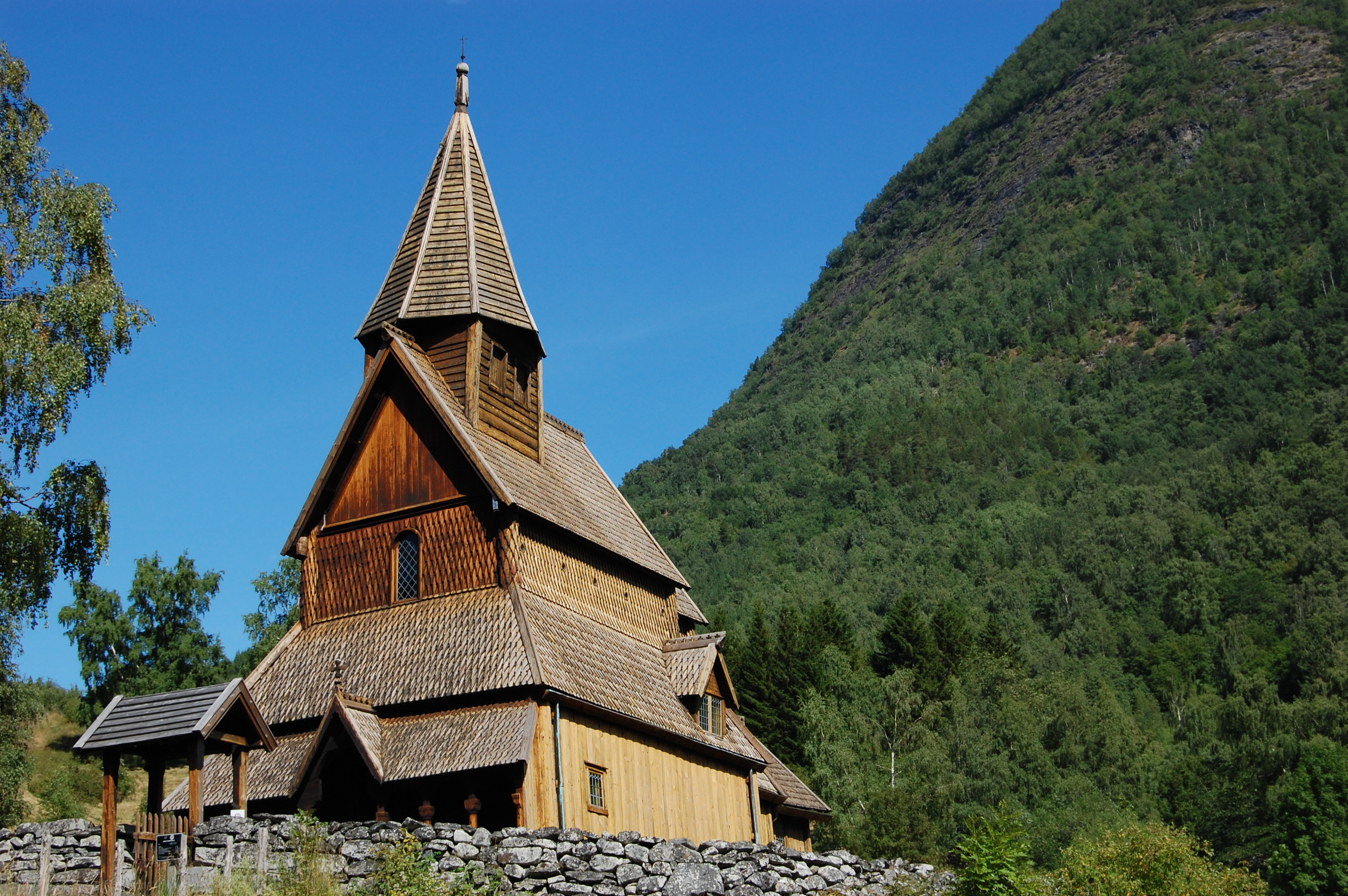 Urnes stavkyrkje